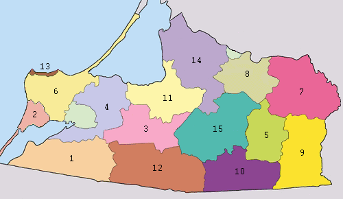 Admin-map-Kaliningrad-region HE